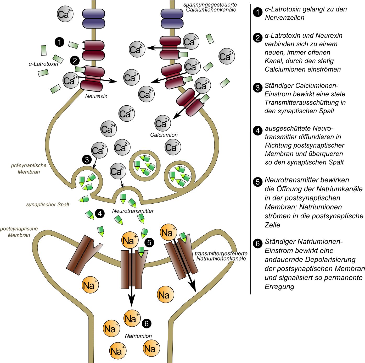 Visualisierung der Wirkungsweise von Alpha-Latrotoxin